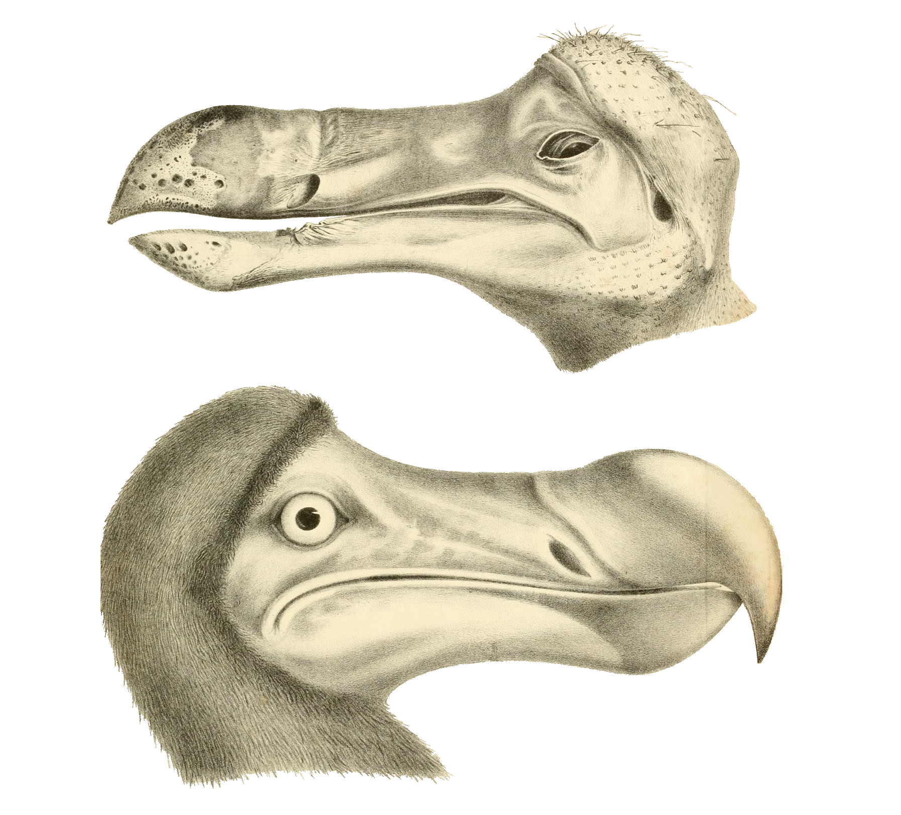 Roub& V ^ Dinlie. del ellitli •jnted hy Httljmandel * 'Walh